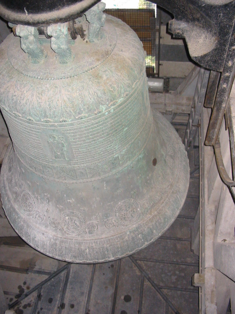 Bourdon fondu en 1845 par Gédéon Morel pour ND de la Garde à Marseille (8234kg)